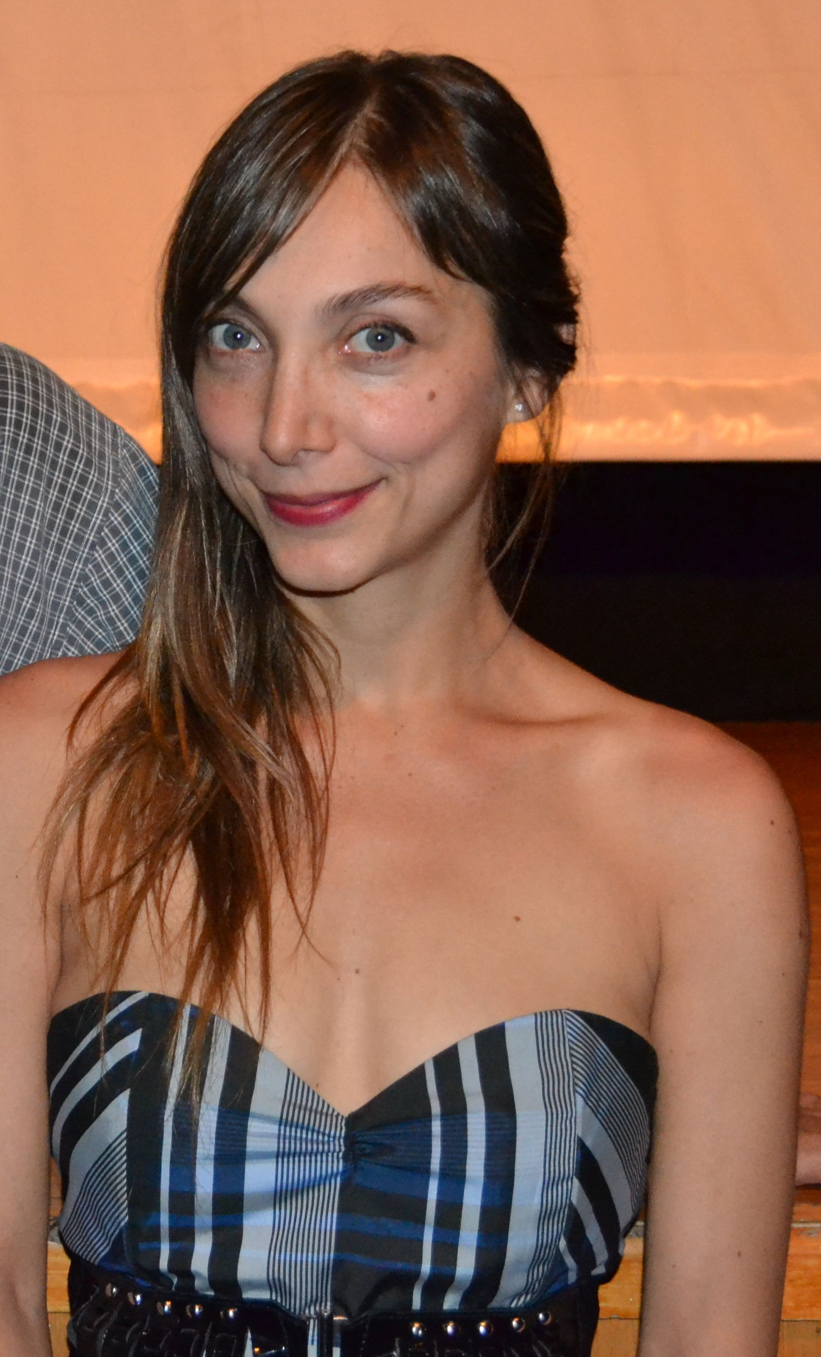 Jenny Alejandra Cavallo Faray (n. Santiago de Chile, 8 de marzo de 1975), es una destacada actriz chilena.